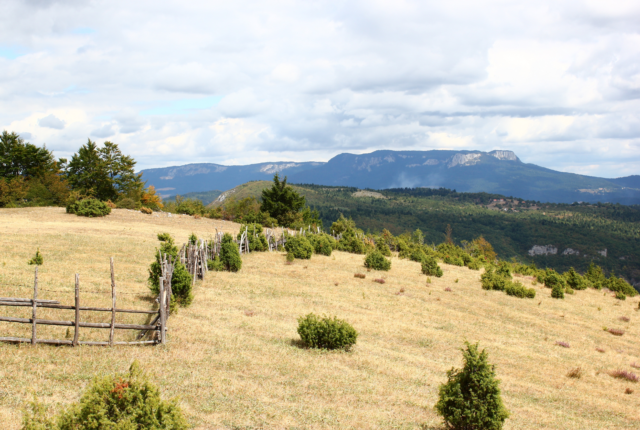 Die Romanija in Bosnien und Herzegowina, gesehen vom Ort Dovlići bei Sarajevo.